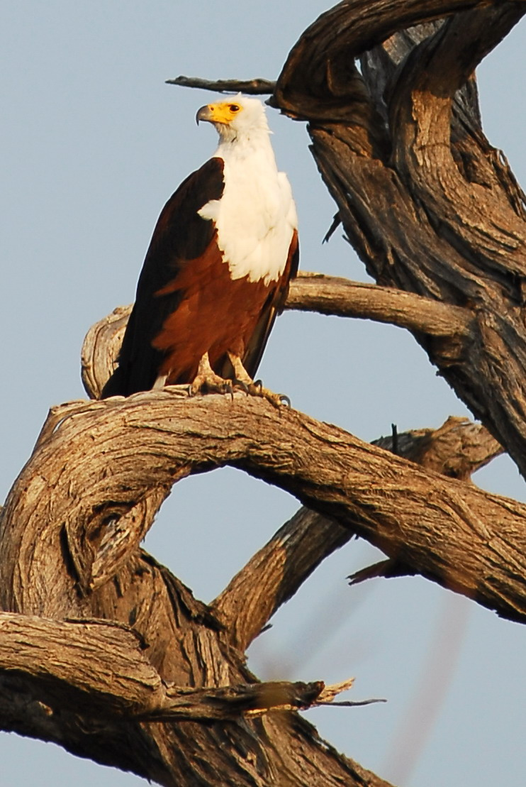 Botswana, Moremi, Okavango